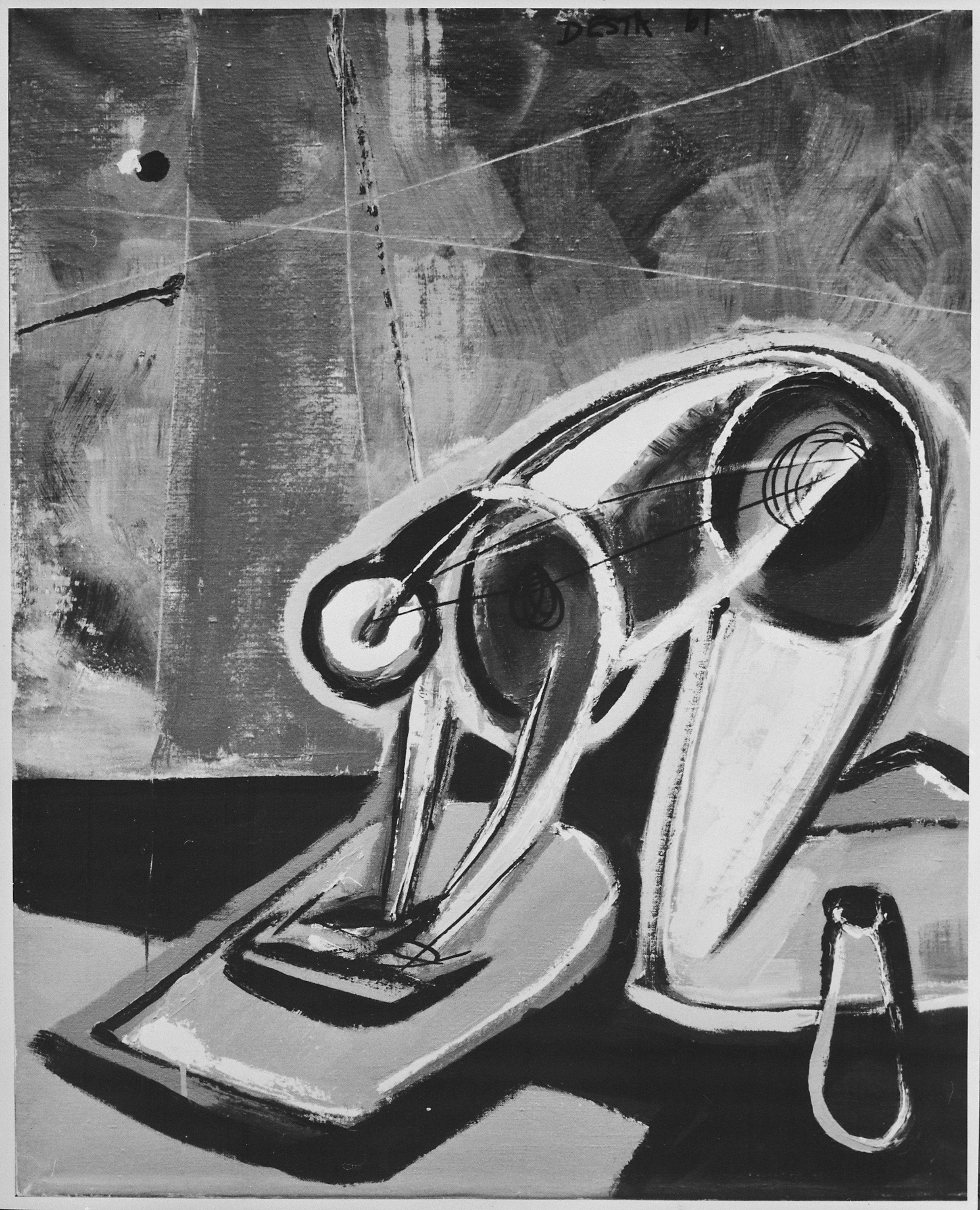 General notes: Oil